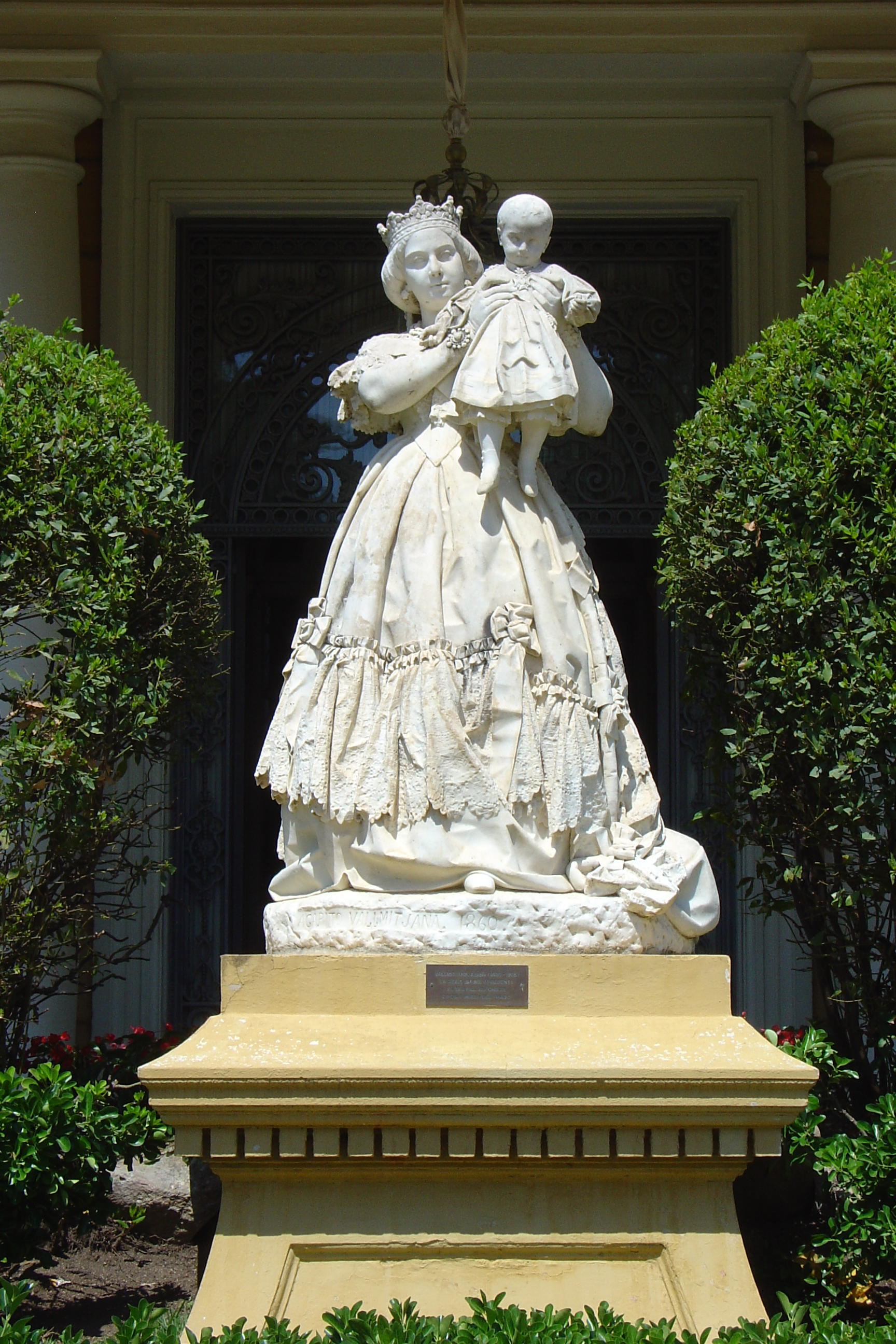 Agapit Vallmitjana: la reina Isabel II presenta el seu fill Alfons XII, 1860, Palau de Pedralbes, Barcelona